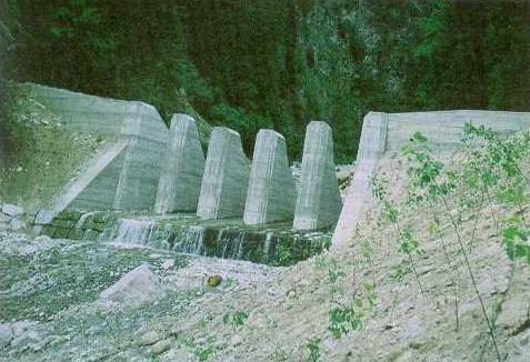 Presa filtrante alpina 1. Vista desde aguas abajo.